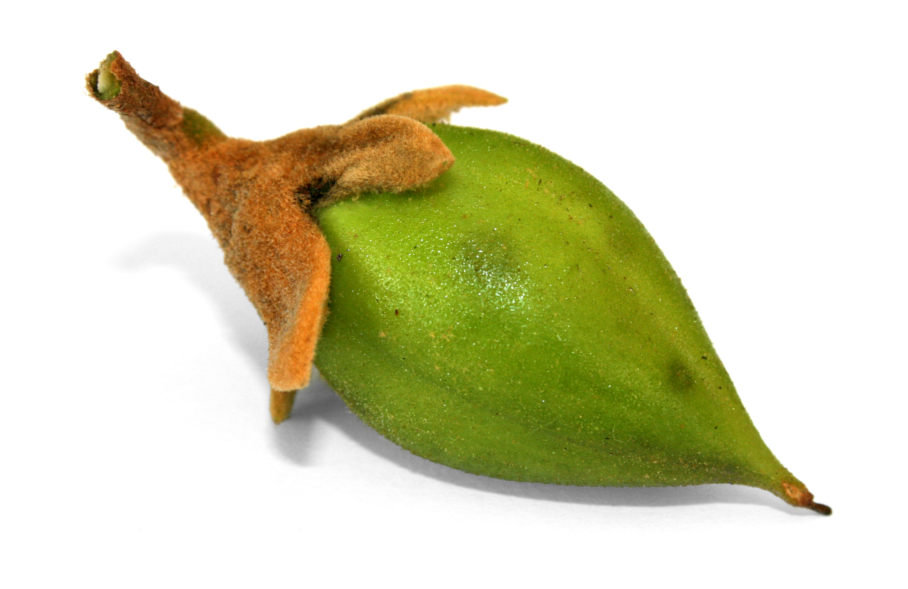 Paulownia Kapselfrucht (geschlossen)